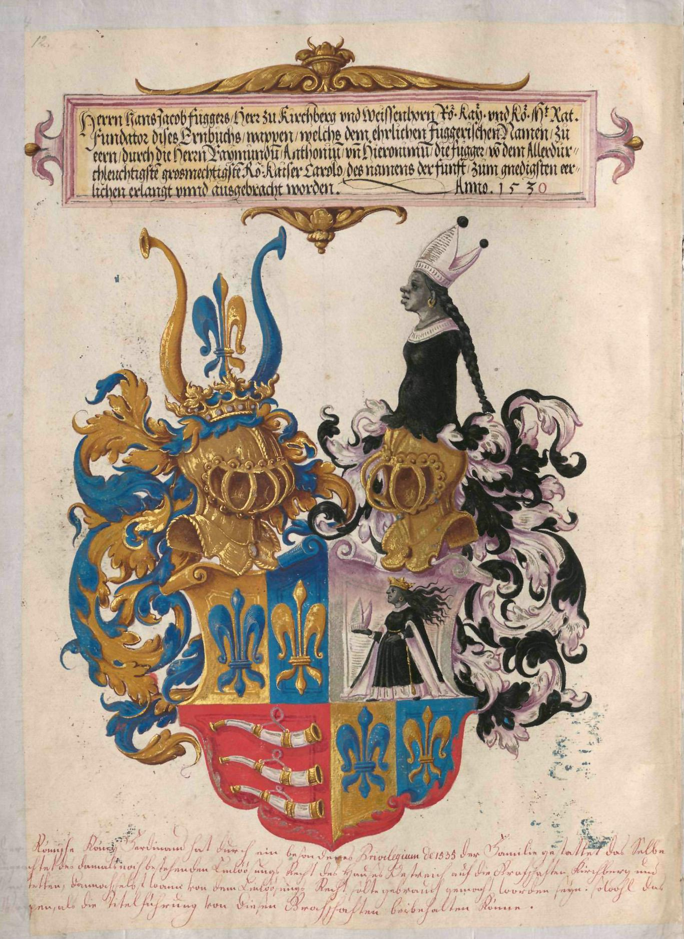 Geheimes Ehrenbuch der Fugger, hergestellt in der Werkstatt Jörg Breu d. J., 1545–1549 Wappendarstellung Fugger von Kirchberg und Weißenhorn